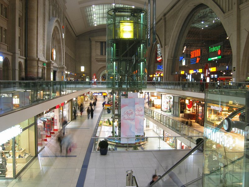 Beschreibung: Einkaufspassage im Leipziger Hauptbahnhof, Langzeitbelichtung Quelle: eigenes Bild Fotograf: Benutzer:FloSch Lizenzstatus: GNU FDL Benutzer:FloSch